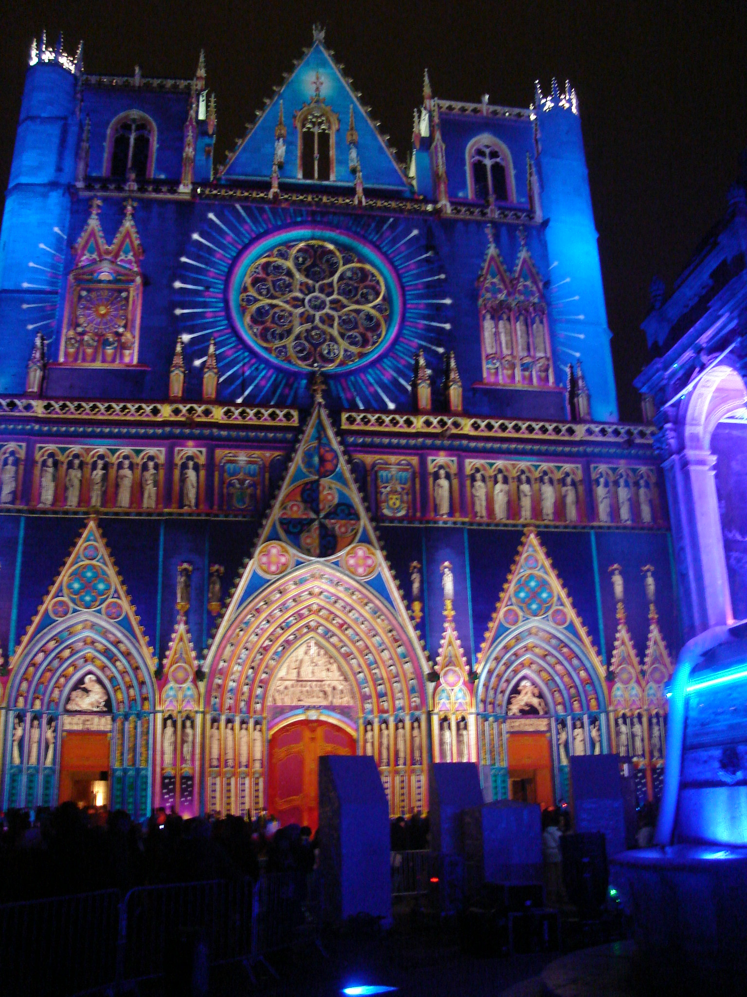 Cathédrale St Jean illuminée par P.Warrener, Lyon